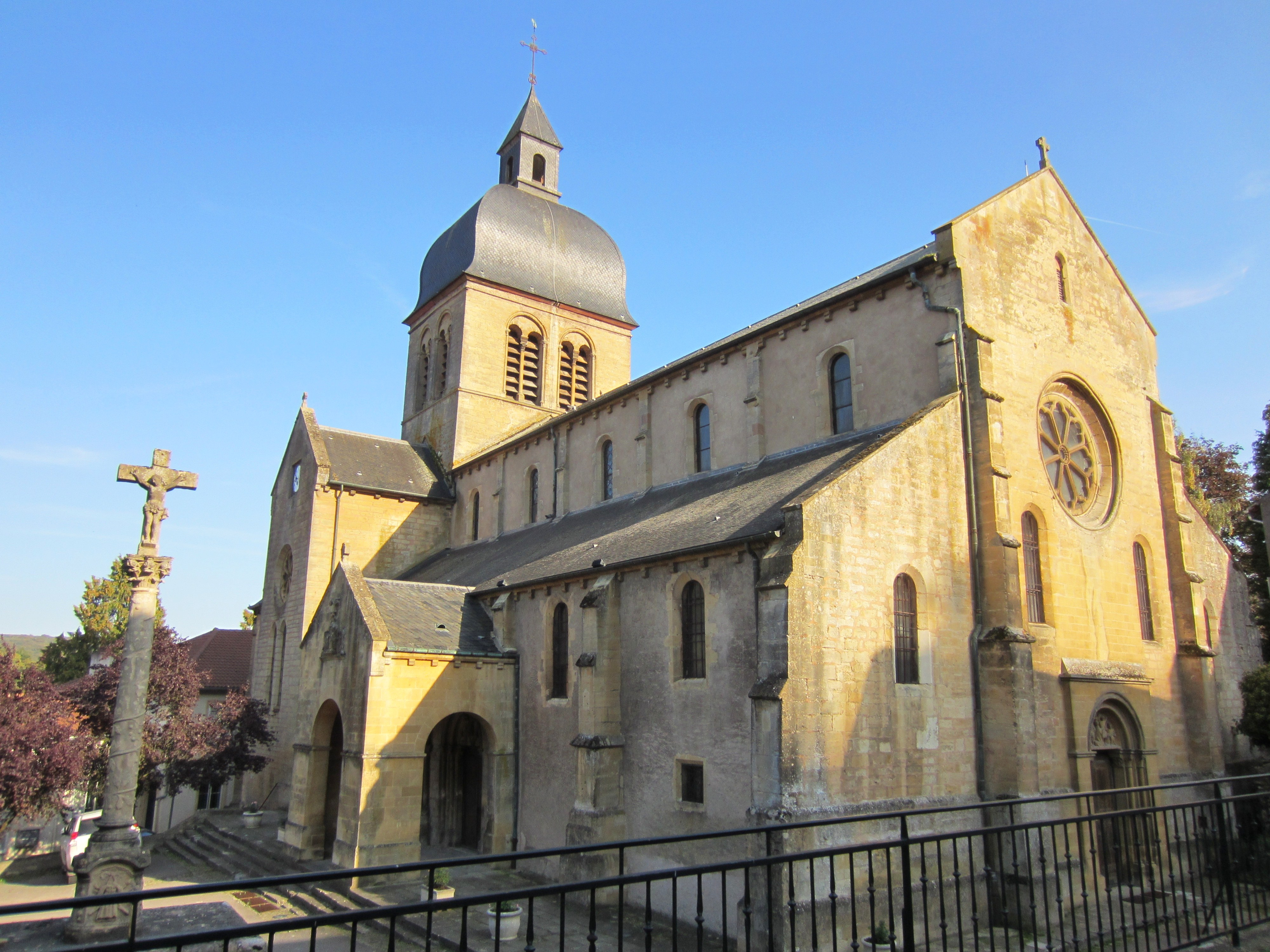 Description eglise saint Etienne de Gorze Date25 September 2011Sourcemon appareil photoAuthorAimelaimePermission (Reusing this file) eglise saint Etienne de Gorze